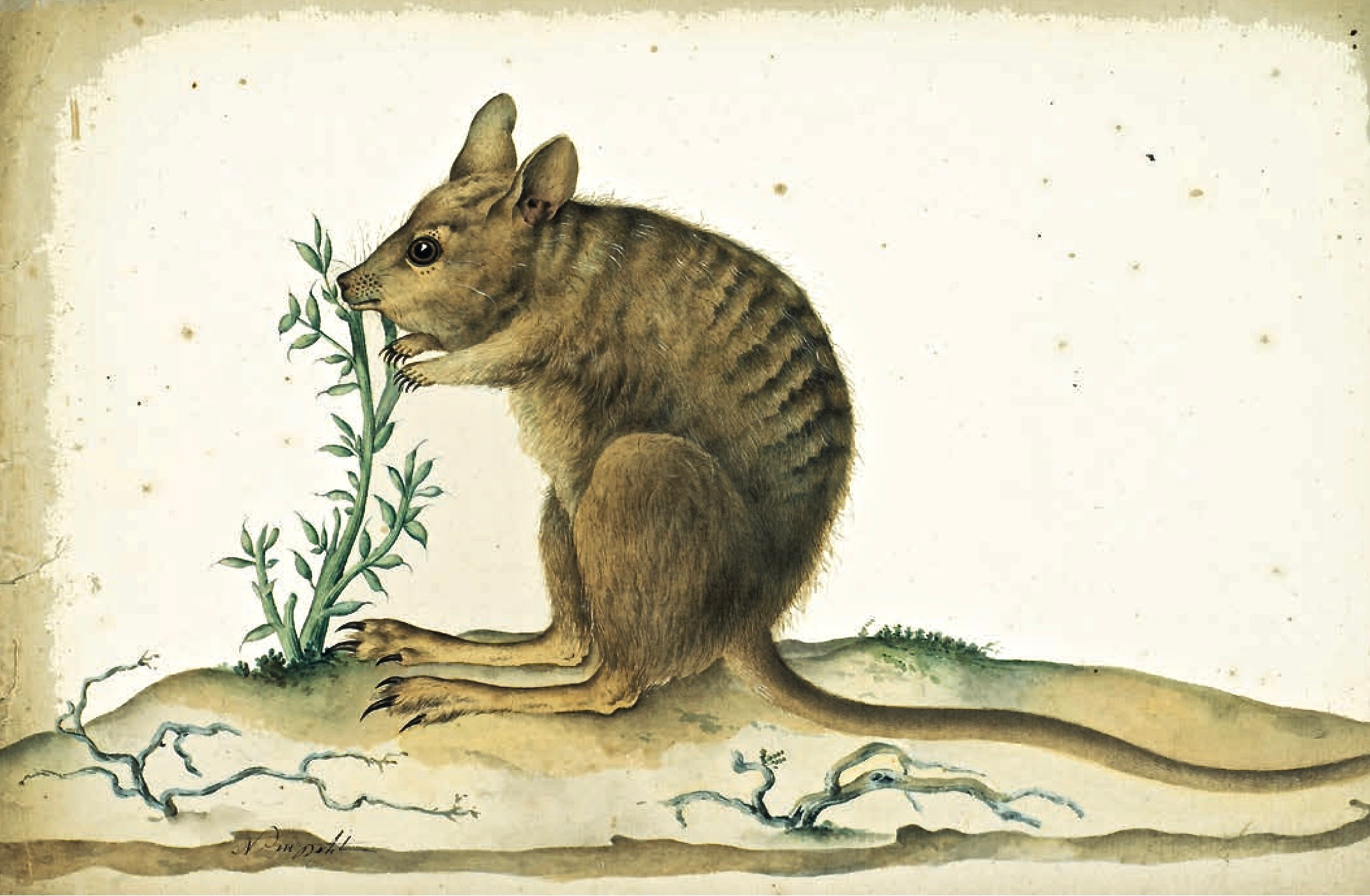 Nicolas-Martin Petit (1777–1804): Gebändertes Hasenkänguru (Lagostrophus faciatus). Wasserfarbe, Gouache und braune Tinte auf Papier. Muséum d’histoire naturelle, Le Havre. Der Künstler war mit Mitglied der französischen Australienexpedition unter Nicolas Baudin (1800–1804).